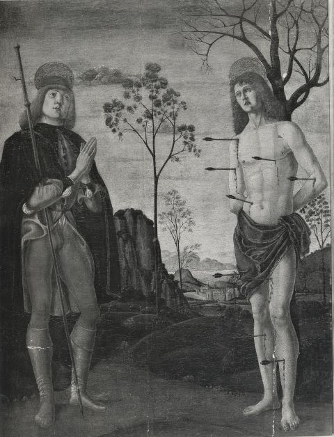 Saint Roch et saint Sébastien